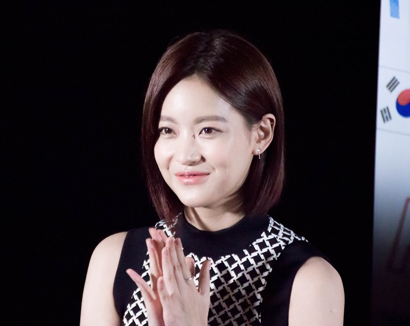 160804 국가대표2 무비토크 오연서